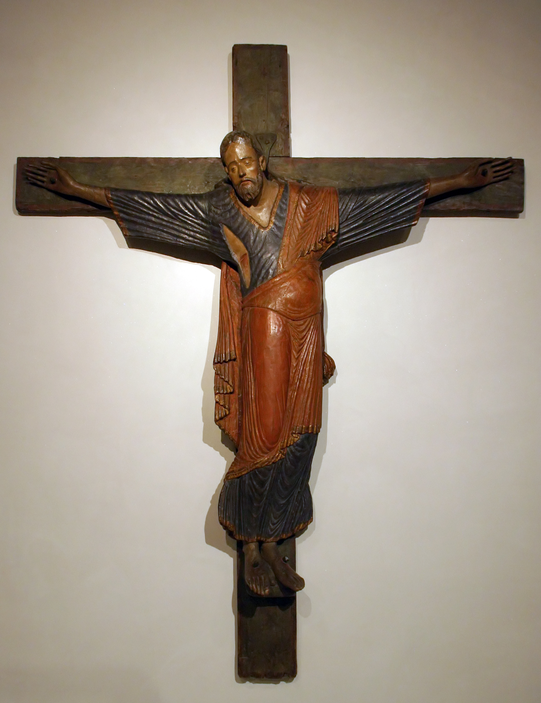 Kruzifix aus Erp, Rheinland, 1. Hälfte 12. Jahrhundert, Nussbaumholz. Kolumba Native nameKolumba - Kunstmuseum des Erzbistums KölnLocationCologneCoordinates50° 56′ 18″ N, 6° 57′ 15″ E Established1853WebsiteKolumbaAuthority control : Q1621165 GND: 2044624-X